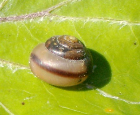 Bradybaena fruticum